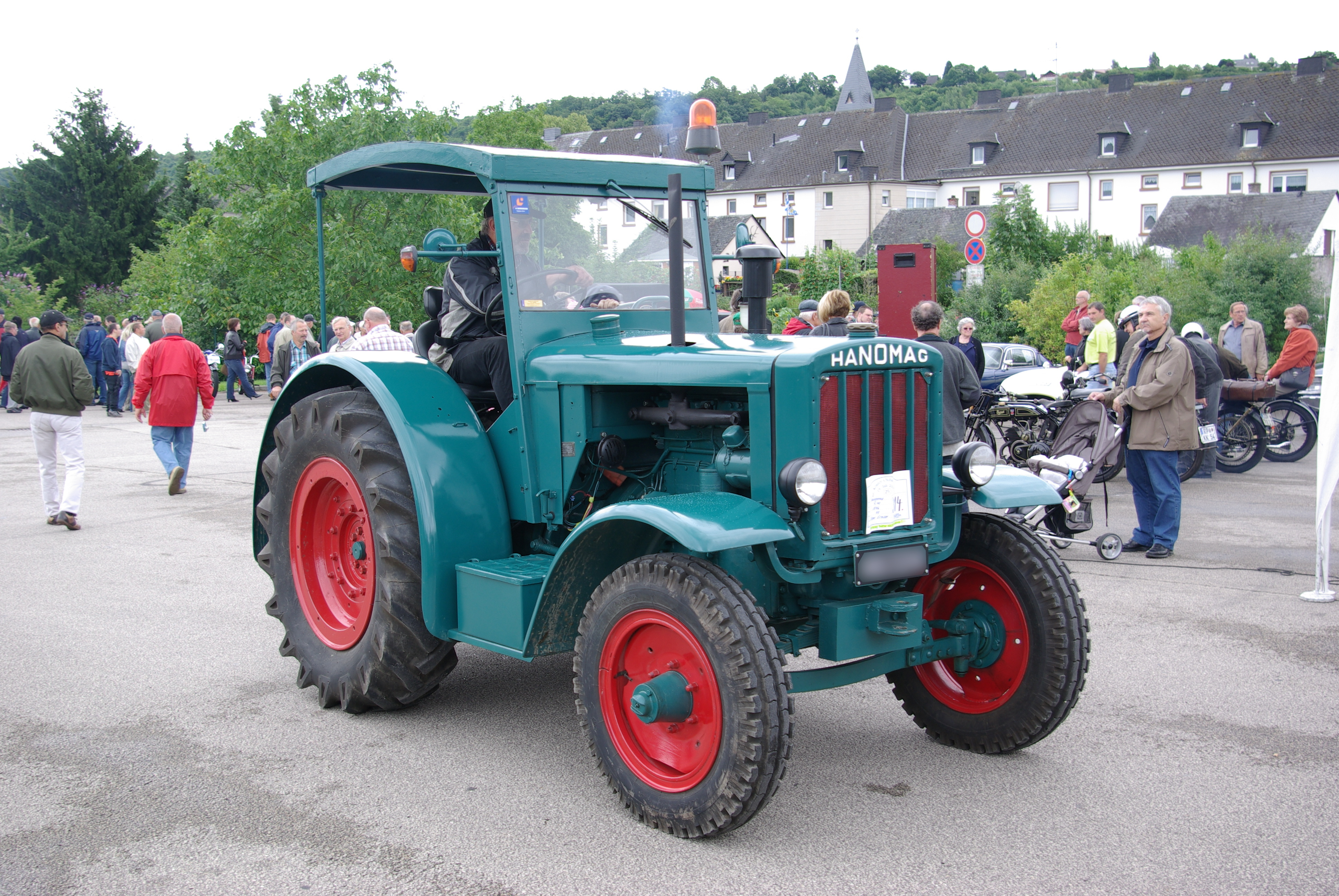 Hanomag R40, Baujahr 1946